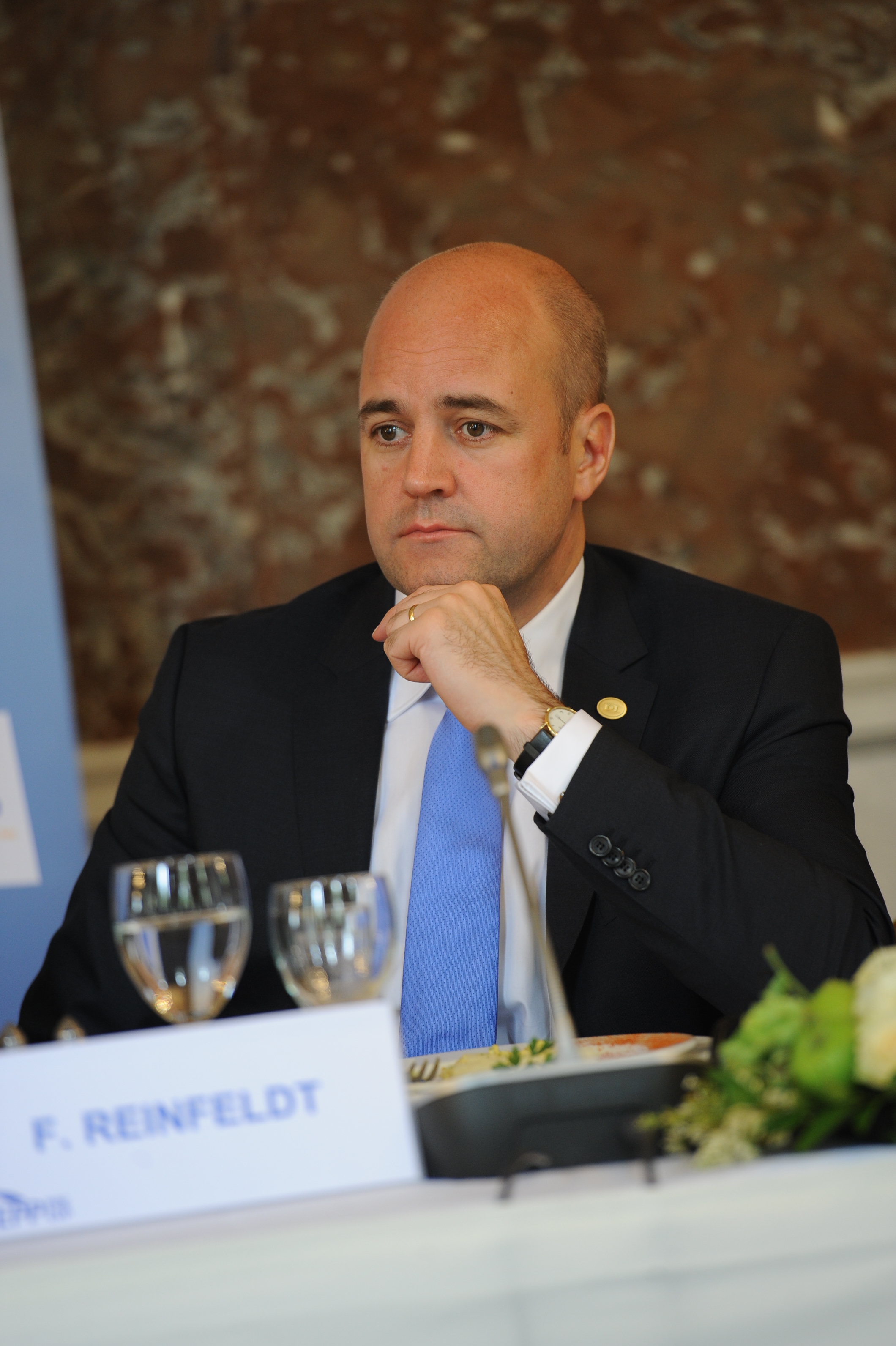 Fredrik Reinfeldt